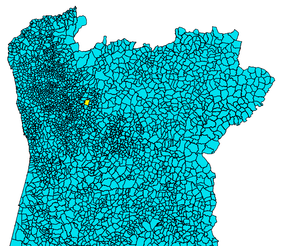 Freguesia do Rego, a amarelo